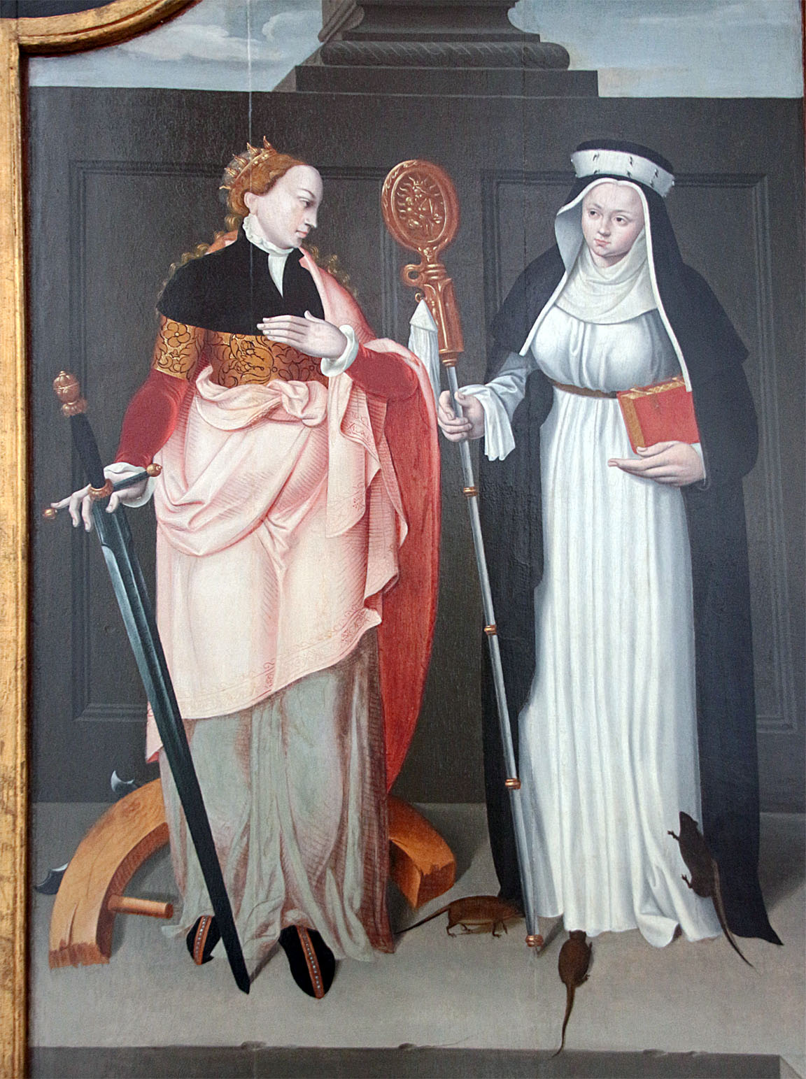 Die hl. Cutubilla (rechts) neben der hl. Katharina von Alexandrien auf einem Flügelaltar in der Kölner Kirche St. Pantaleon